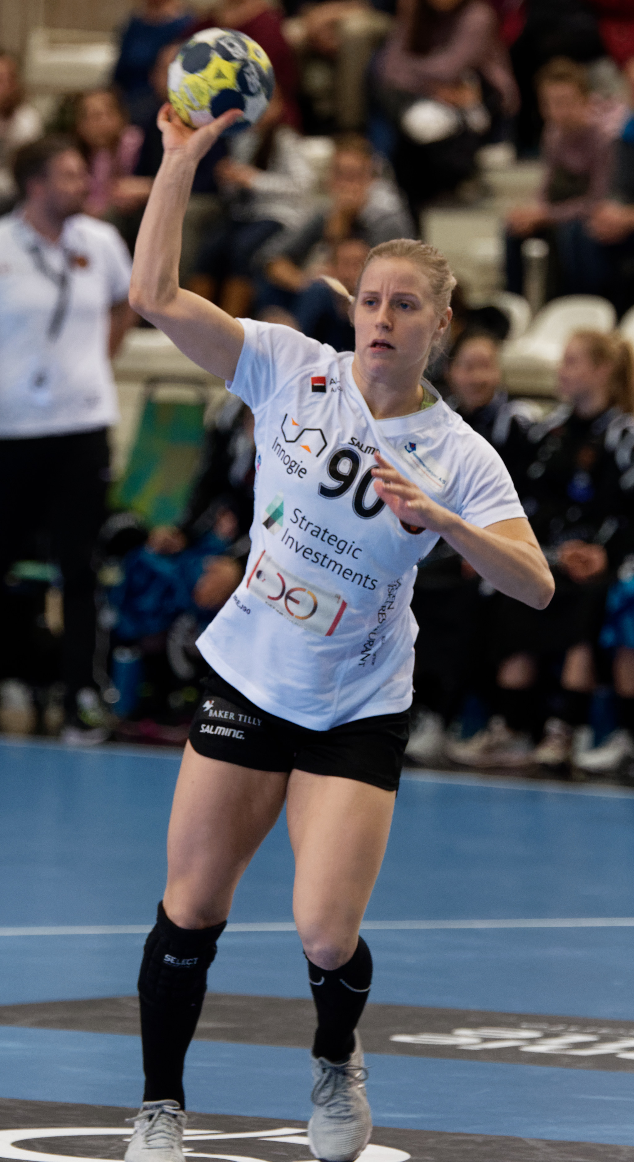 Rencontre du tour principal de la coupe EHF entre Issy Paris Hand et les danoises de Copenhague. A Issy Les Moulineaux, le 28 janvier 2018.